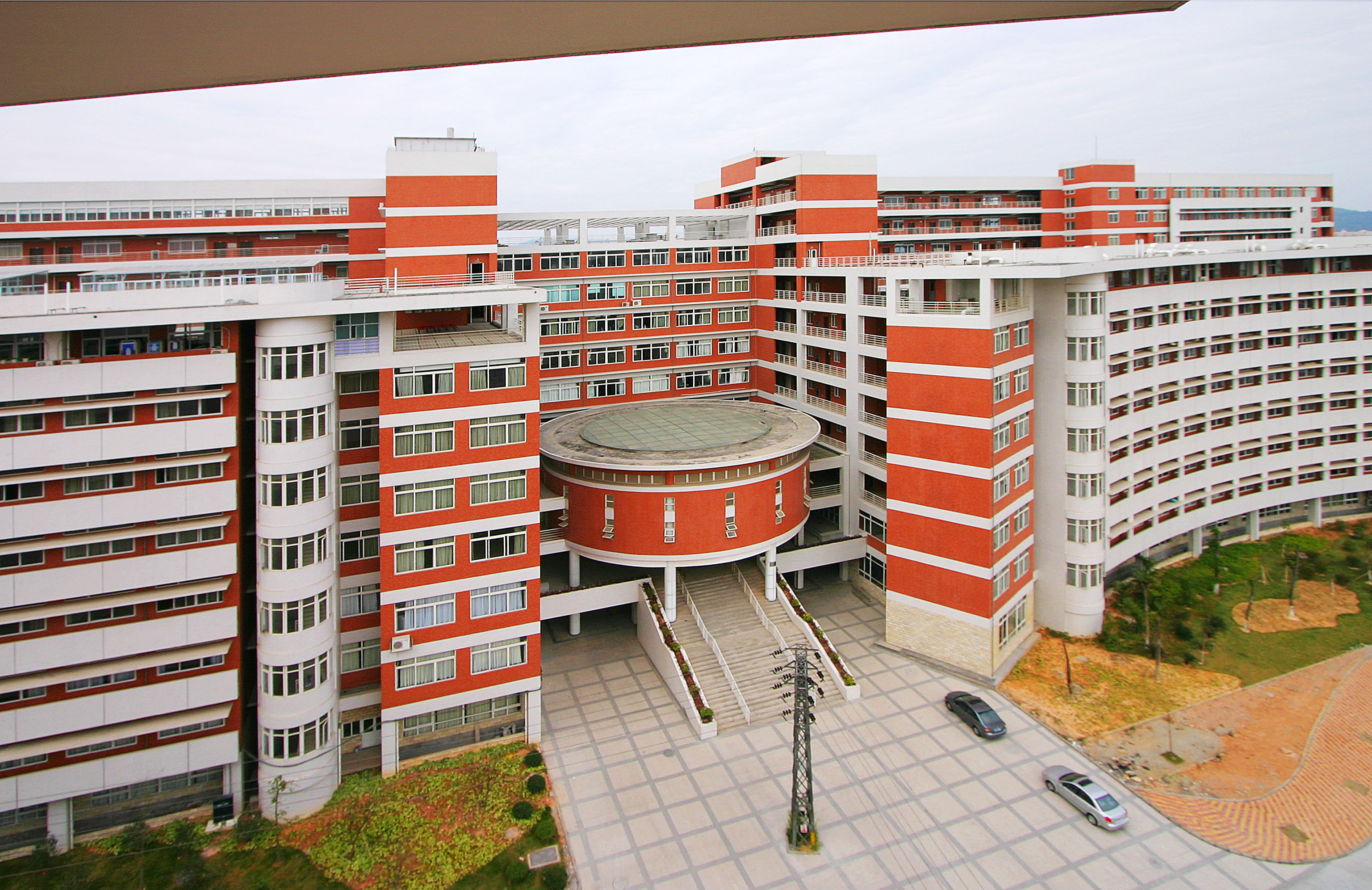 华南农业大学，从农学院俯瞰资源环境学院